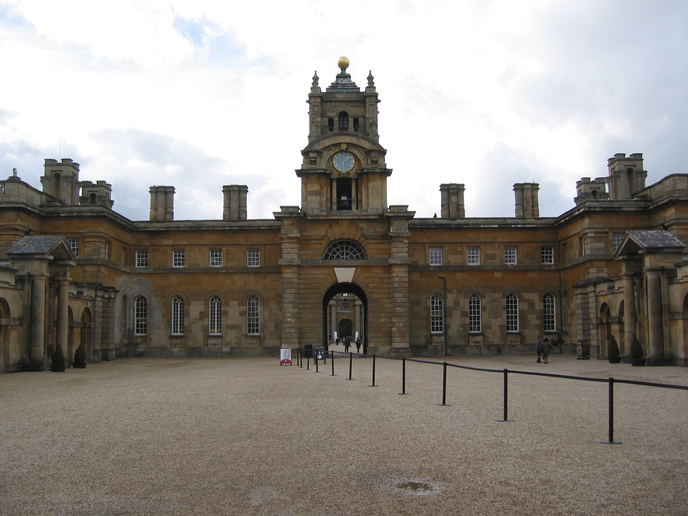 Blenheim Palace